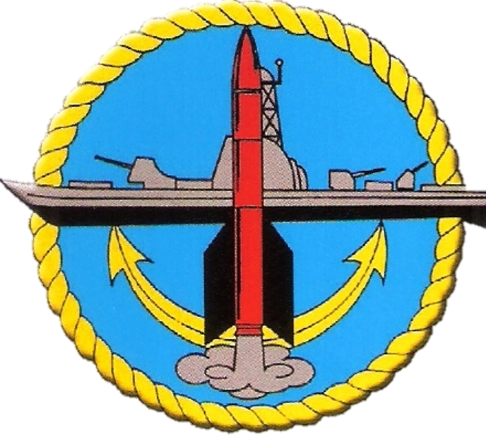 סמל שייטת 3 - שייטת ספינות הטילים